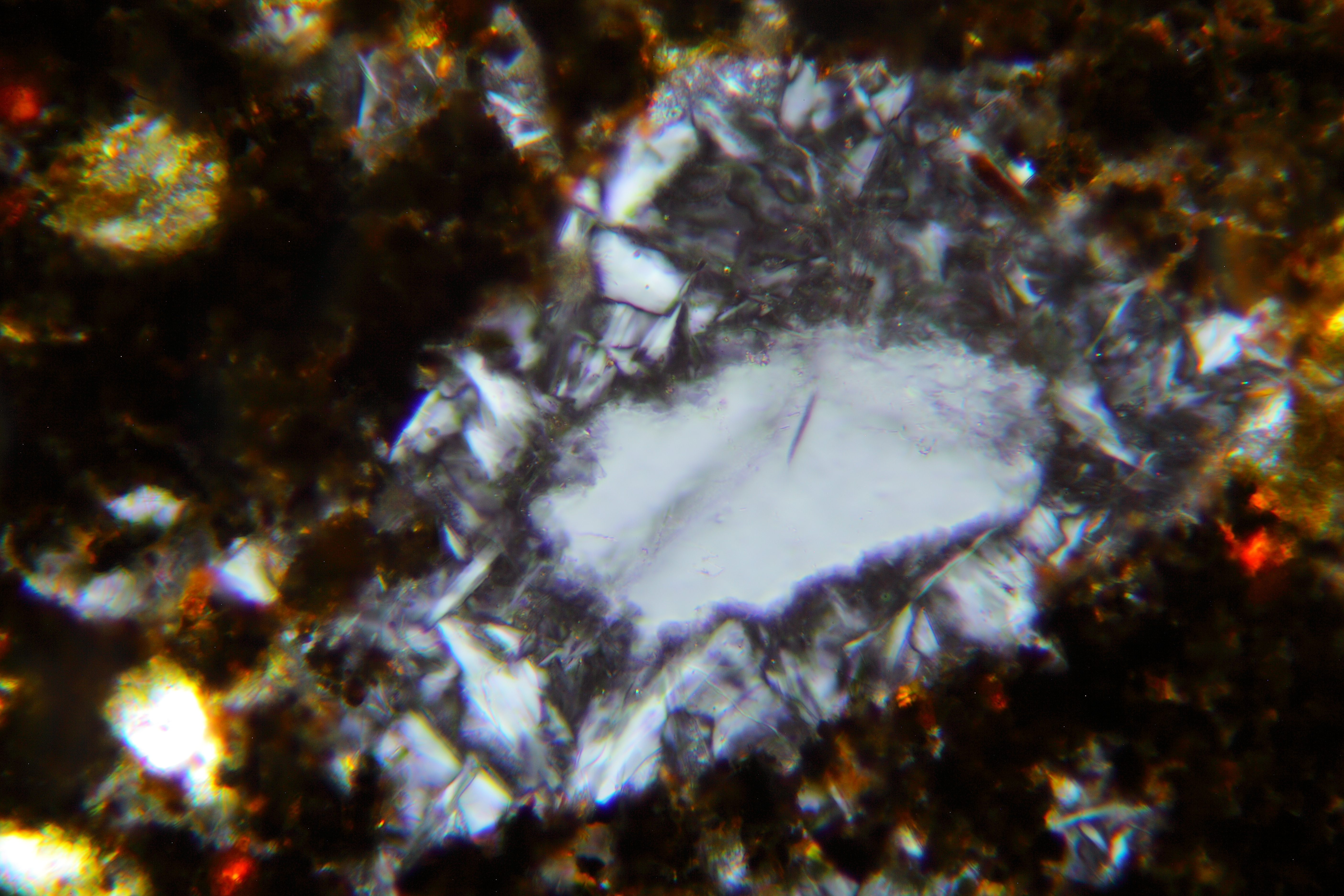 Umnwandlung von Quarz in Tridymit in einem gefritteten Gestein (Dünnschliff, XPL)